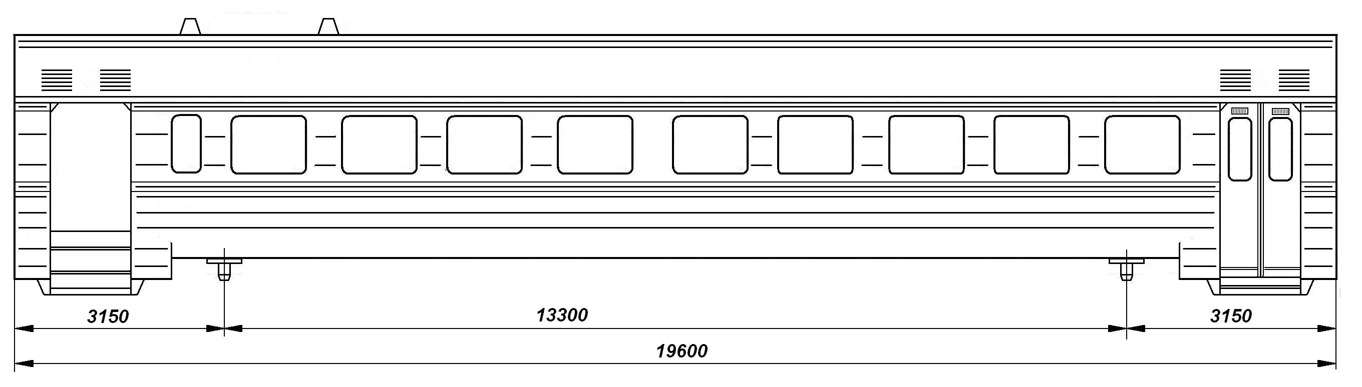 Кузов моторного вагона электропоездов ЭР2, ЭР9, ЭР12